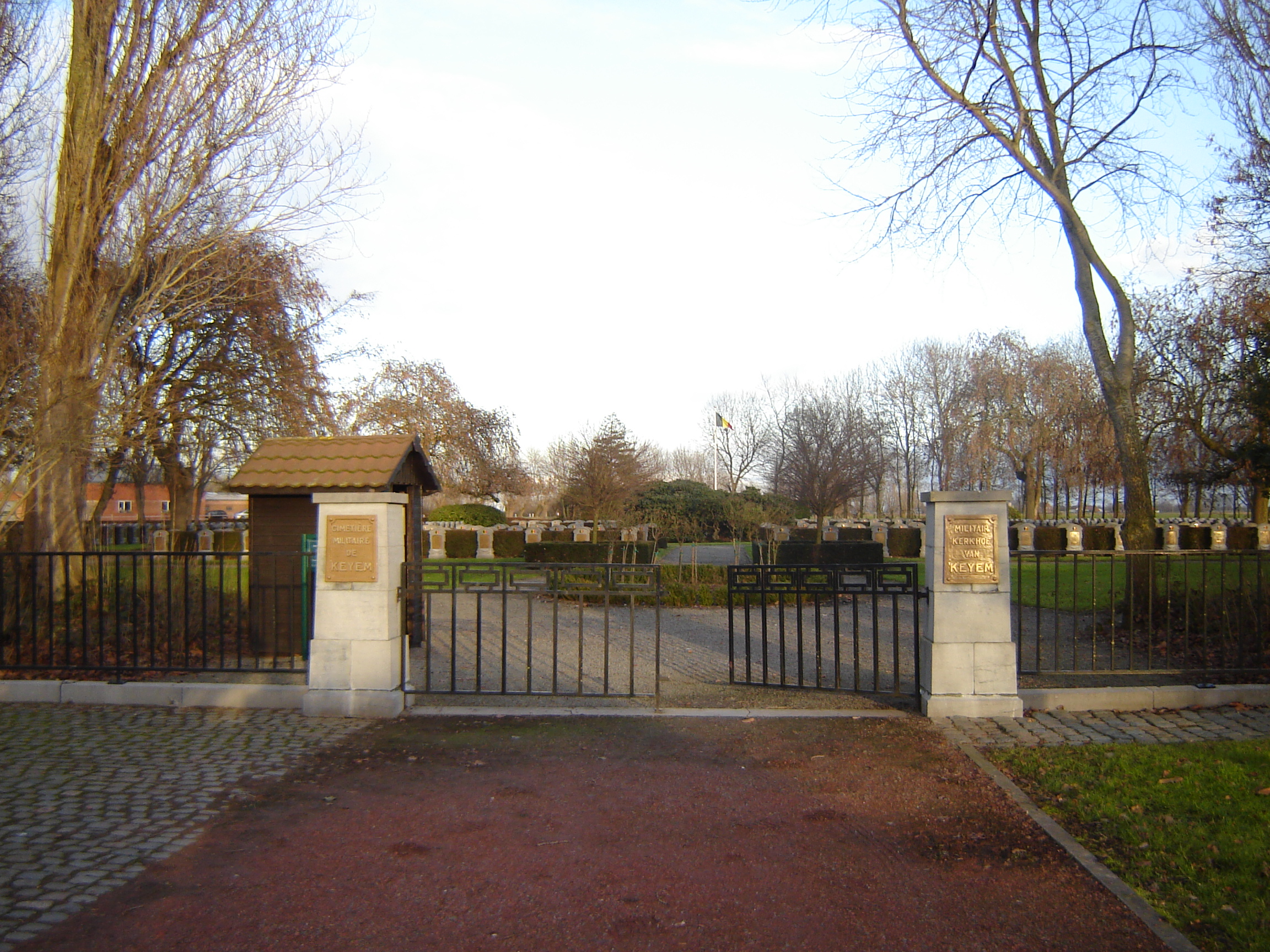 Belgisch oorlogskerkhof in Keiem Belgian Military Cemetery in Keiem. World War I military cemetery with the graves of 590 Belgians. Keiem, Diksmuide, West Flanders, Belgium